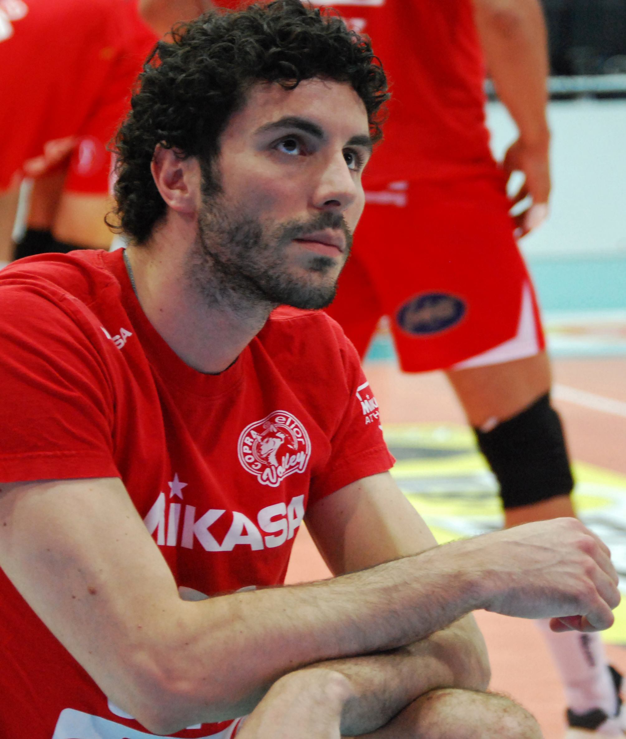 Gabriele Maruotti